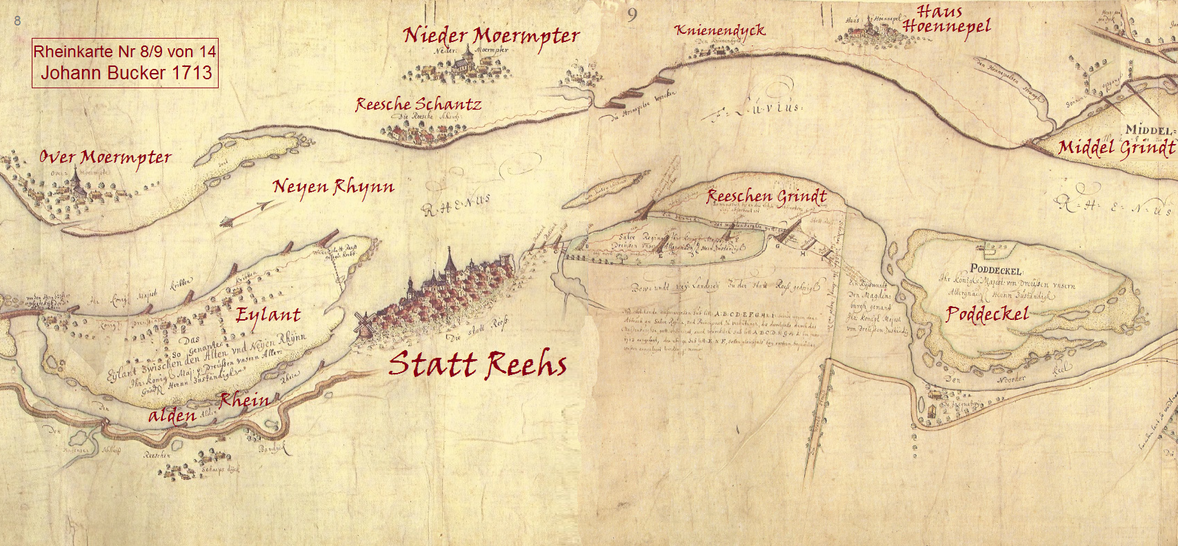 Rheinkarte von Johann Bucker, Rhein bei Rees anno 1713